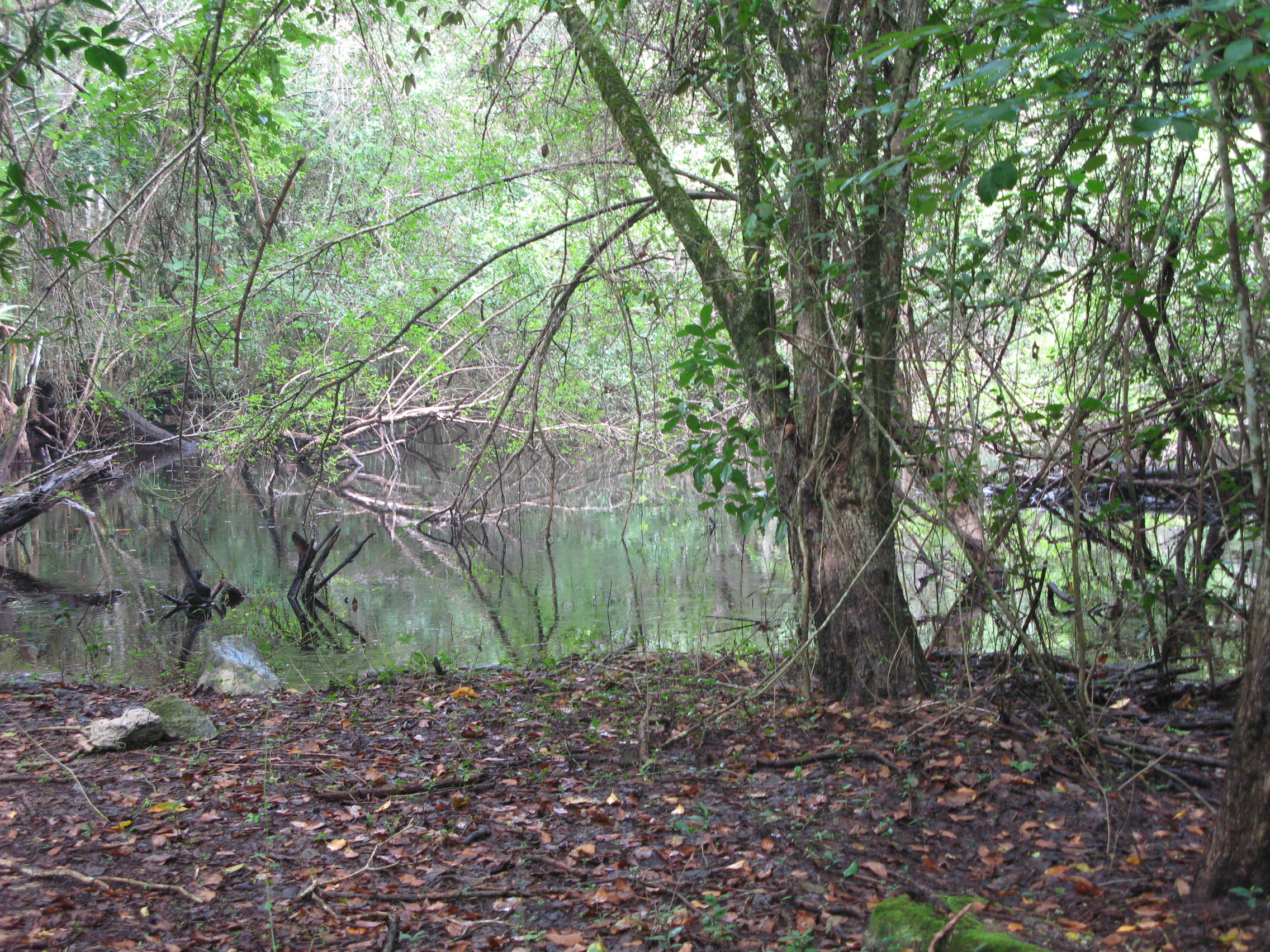 Aguada je jezerce, kjer se zaradi nepropustnih tal nabere voda.